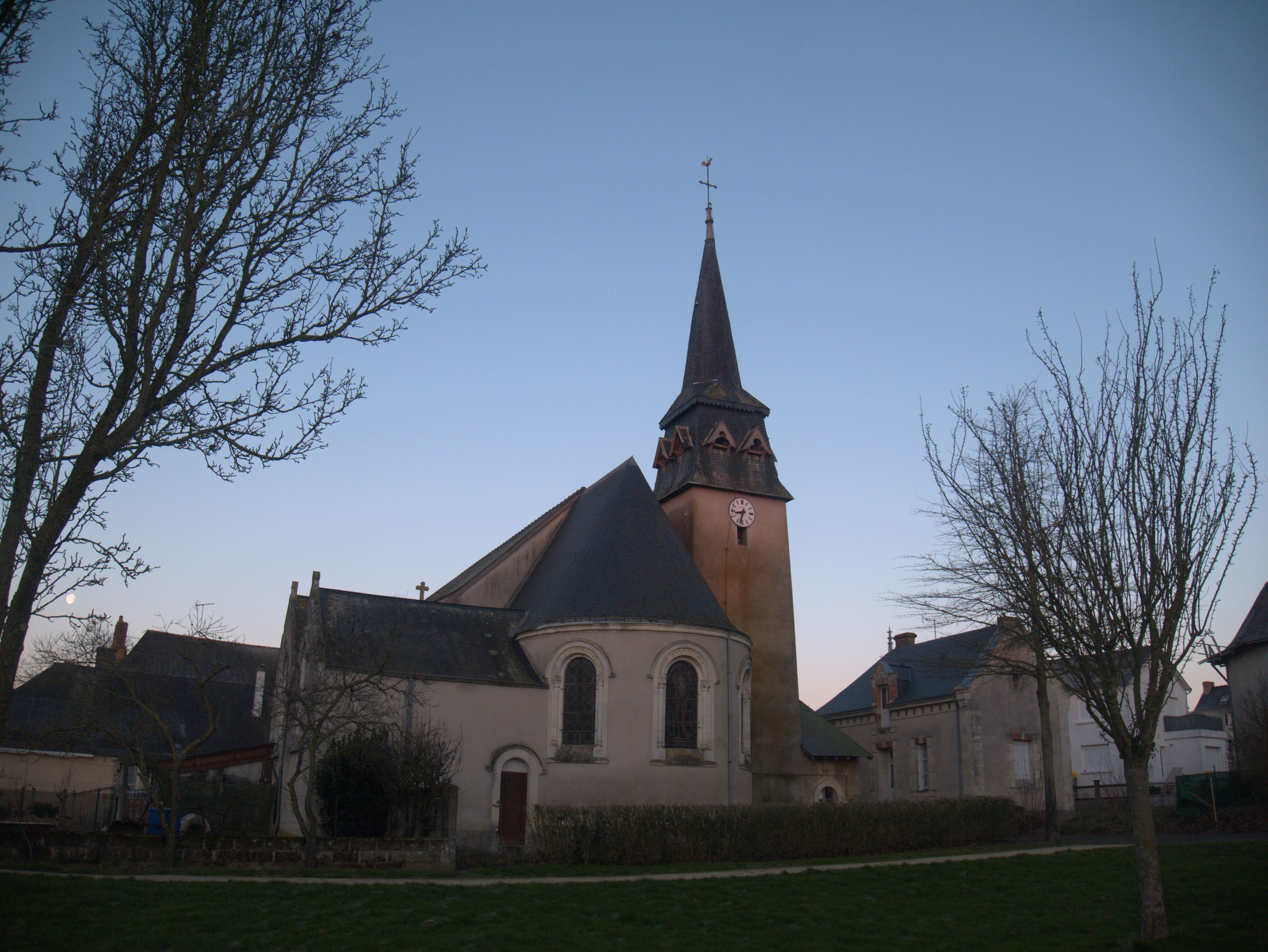 Marigné-Peuton église